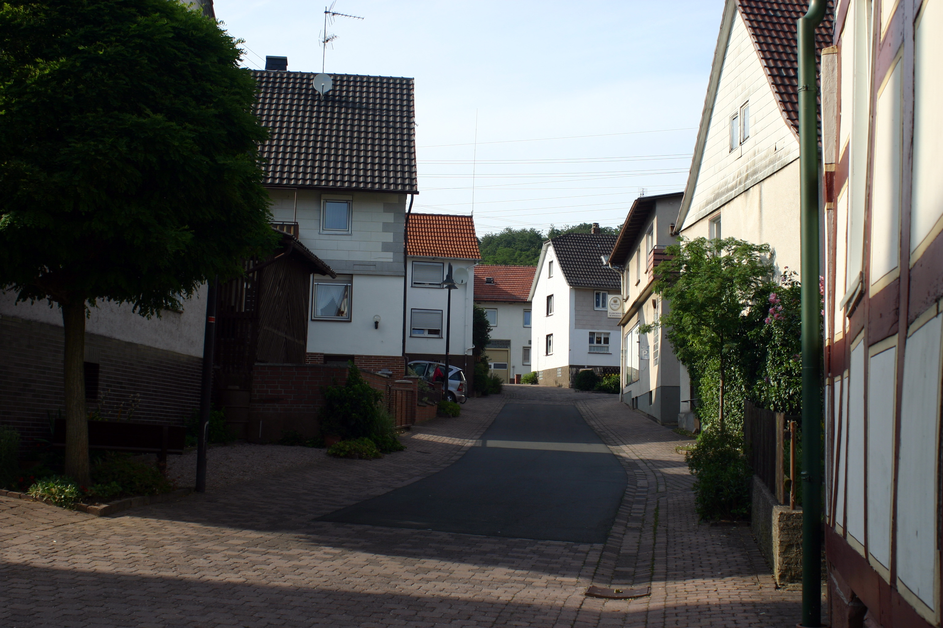 Borken (Hessen) - Stadtteil Kerstenhausen - Hoheneicherstraße